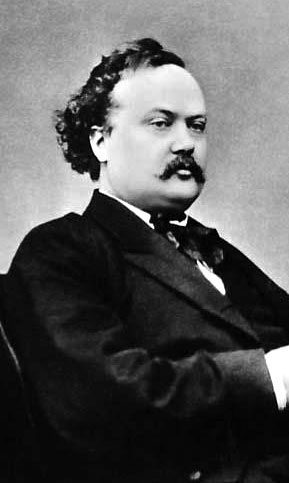 August Söderman